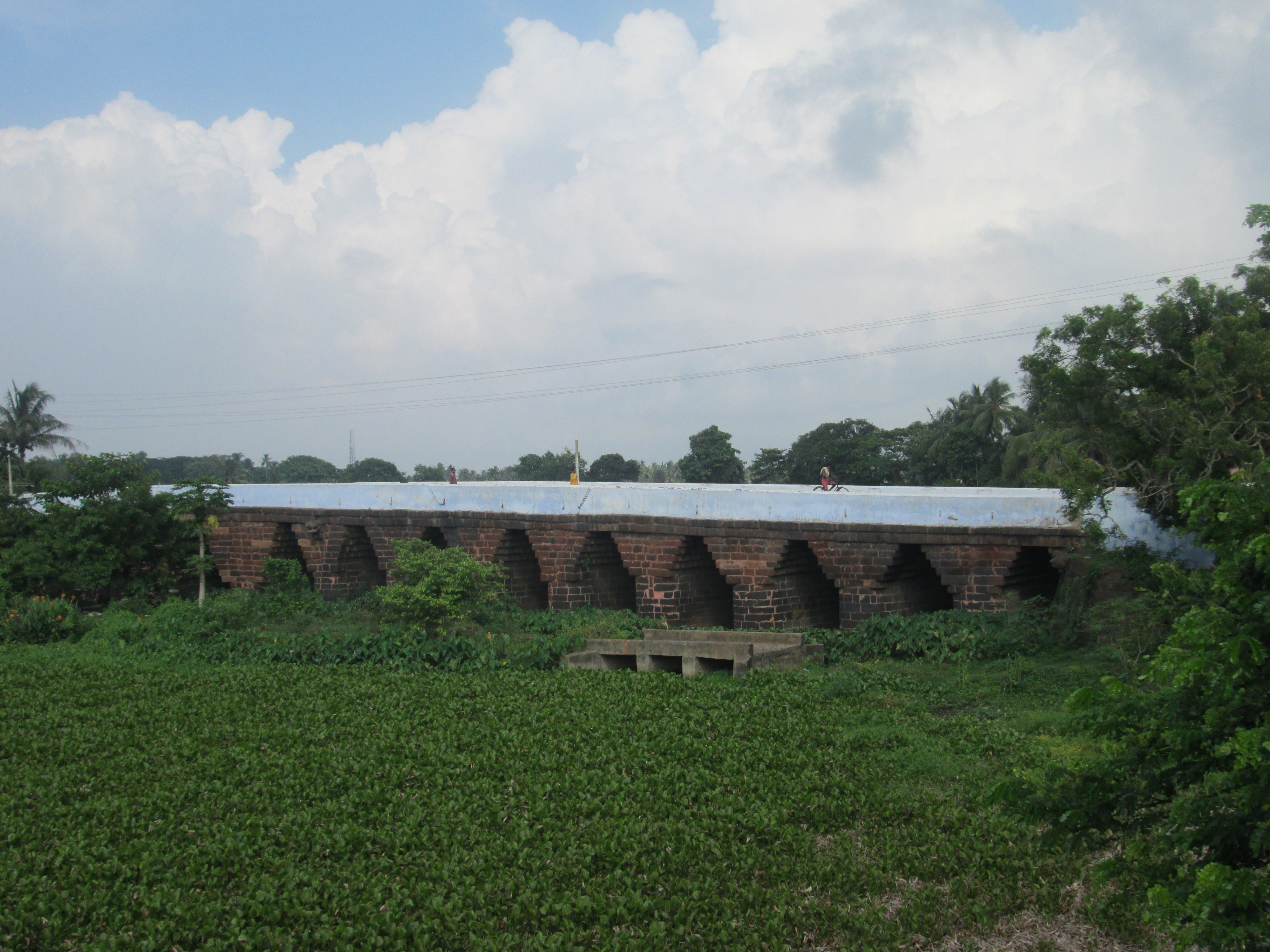 ଓଡ଼ିଆ: ଅଠର ନଳା, ପୁରୀ